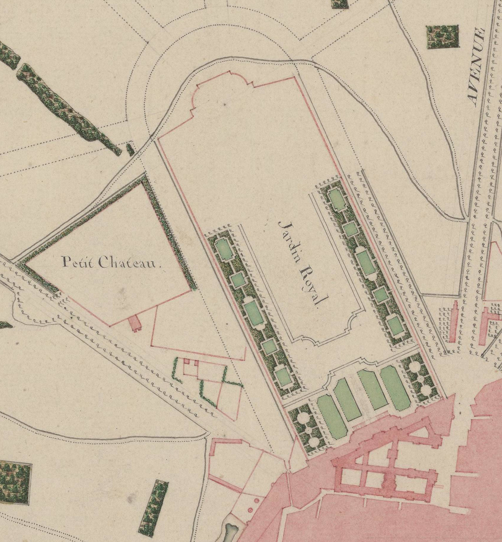 Schloss Compiègne und sein Garten im Zustand des Jahres 1790